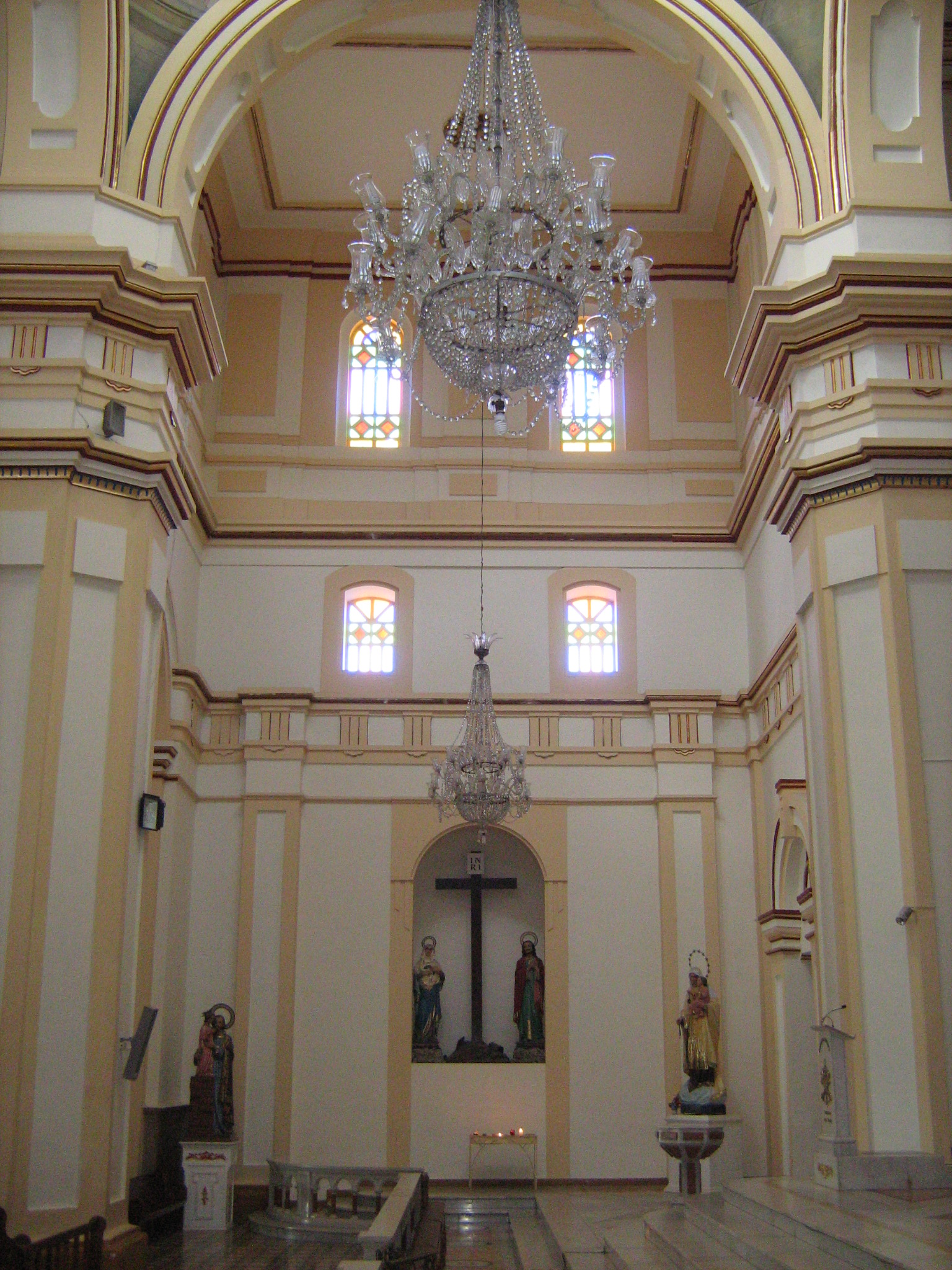 Vista del transepto de la Basílica de Yarumal. Antioquia, Colombia.